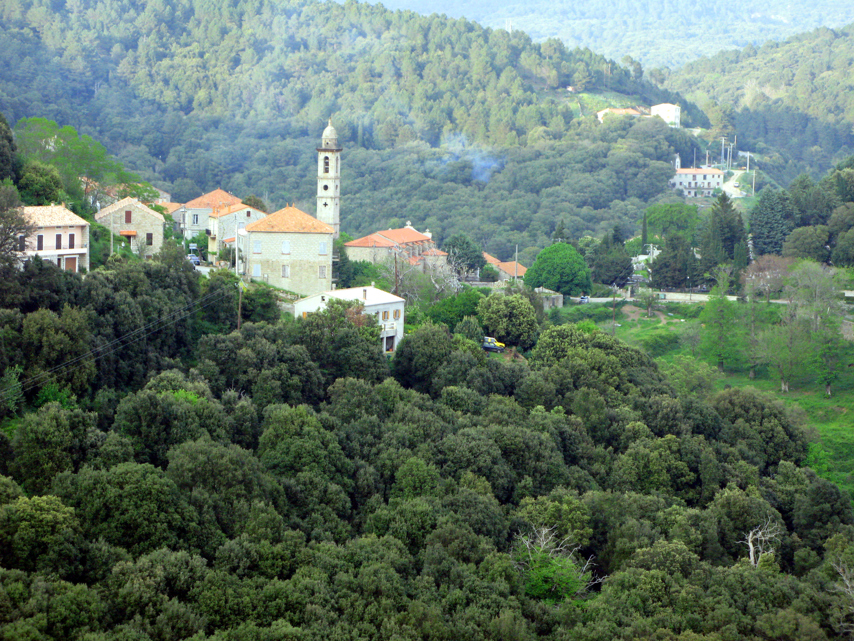 Levie (Corse-du-Sud, France)